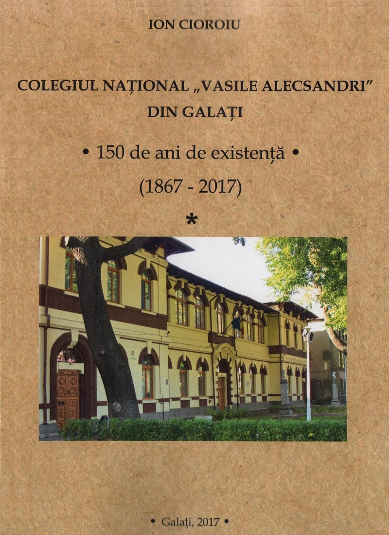 Colegiul Naţional „Vasile Alecsandri” din Galaţi - Monografie 2017